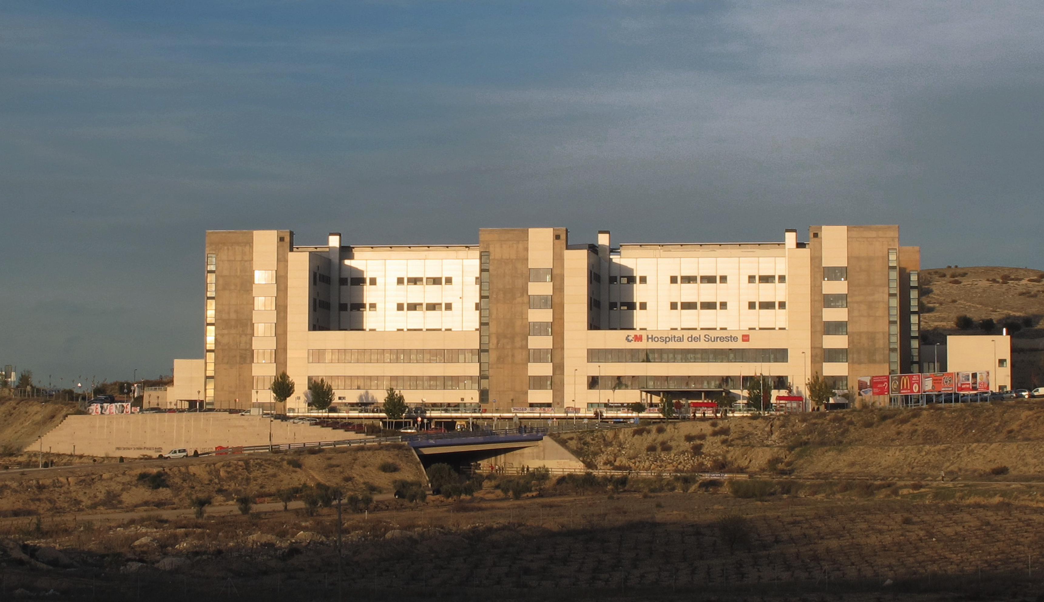 El Hospital del Sureste presta atención sanitaria a 150.000 residentes de los municipios de Arganda del Rey, Belmonte del Tajo, Brea de Tajo, Estremera, Fuentidueña del Tajo, Valdaracete, Villamanrique de Tajo, Villarejo de Salvanés, Carabaña, Morata de Tajuña, Orusco, Perales de Tajuña, Tielmes, Valdilecha, Ambite, Campo Real, Nuevo Baztán, Olmeda de las Fuentes, Pozuelo del Rey, Villar del Olmo y Rivas Vaciamadrid.